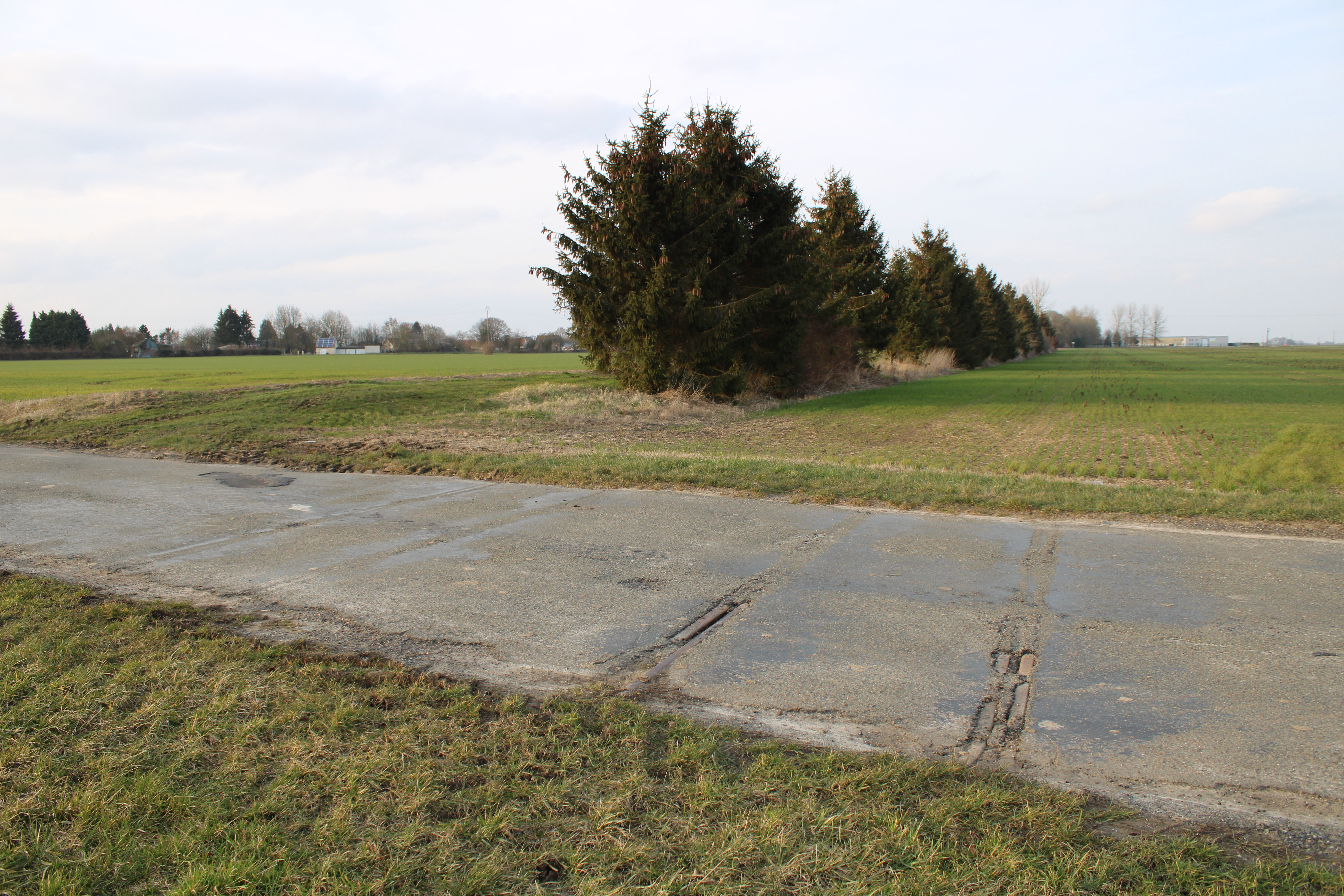 Rails de l'ancienne voie ferrée.